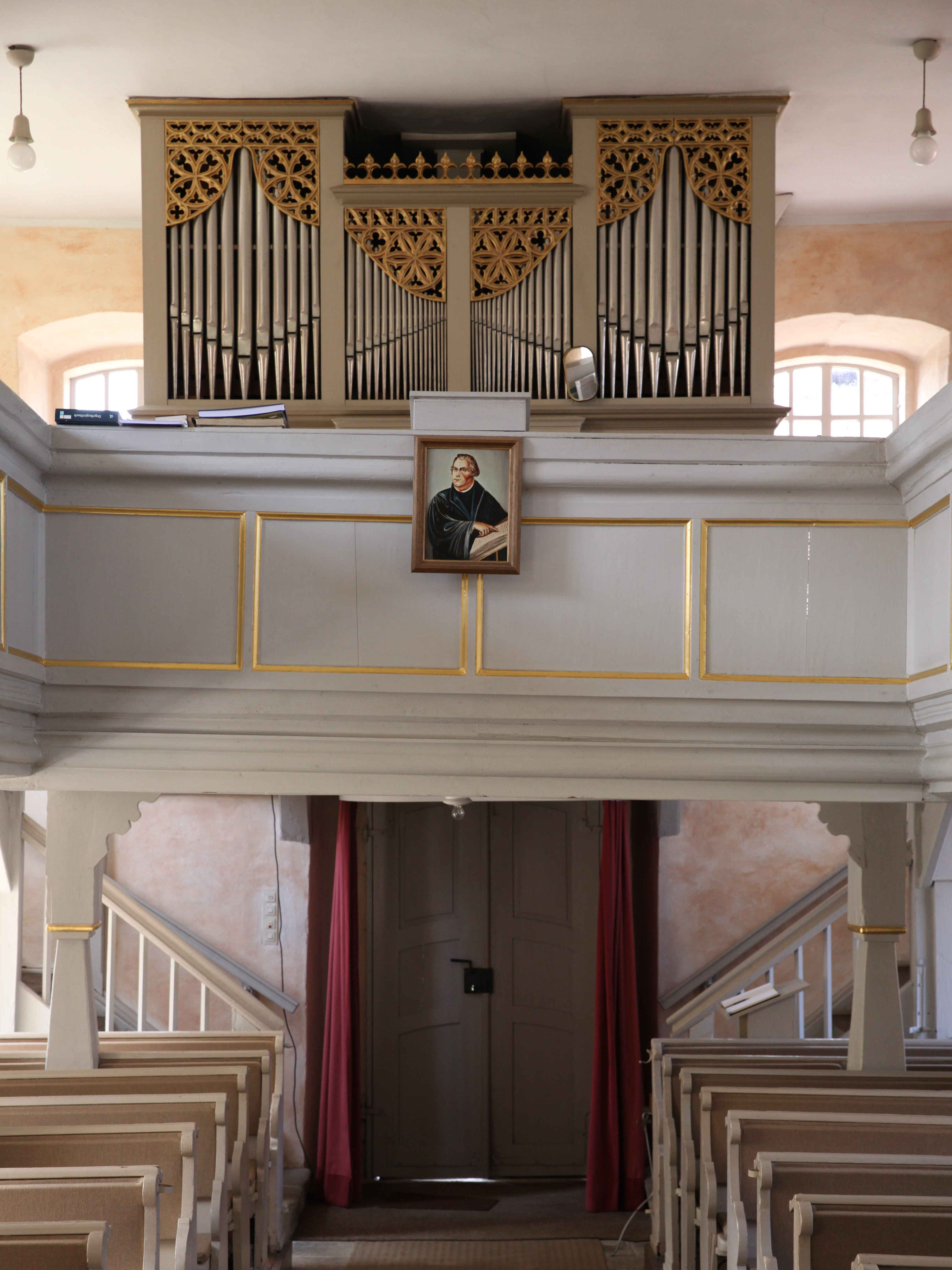 St. Paulus